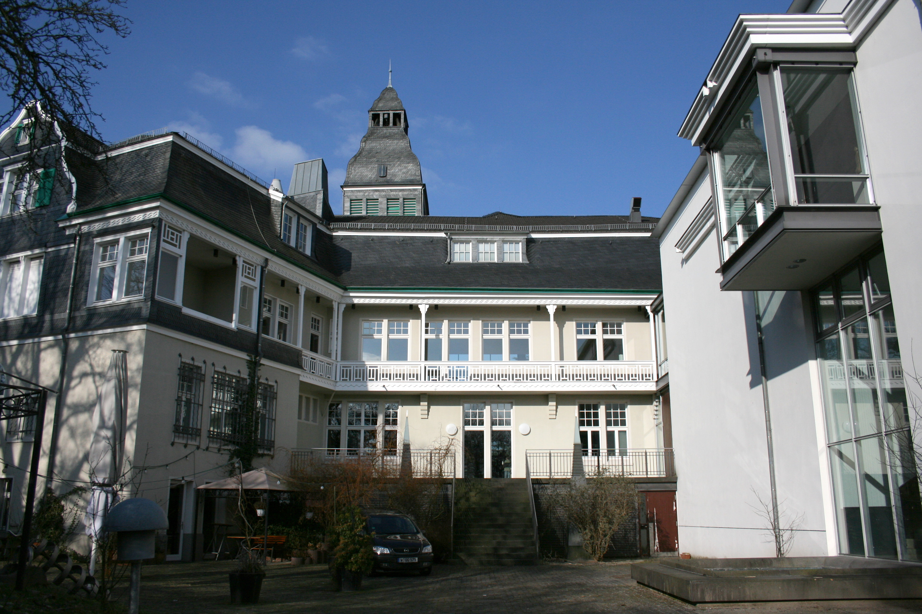 Museum Baden in Solingen-Gräfrath